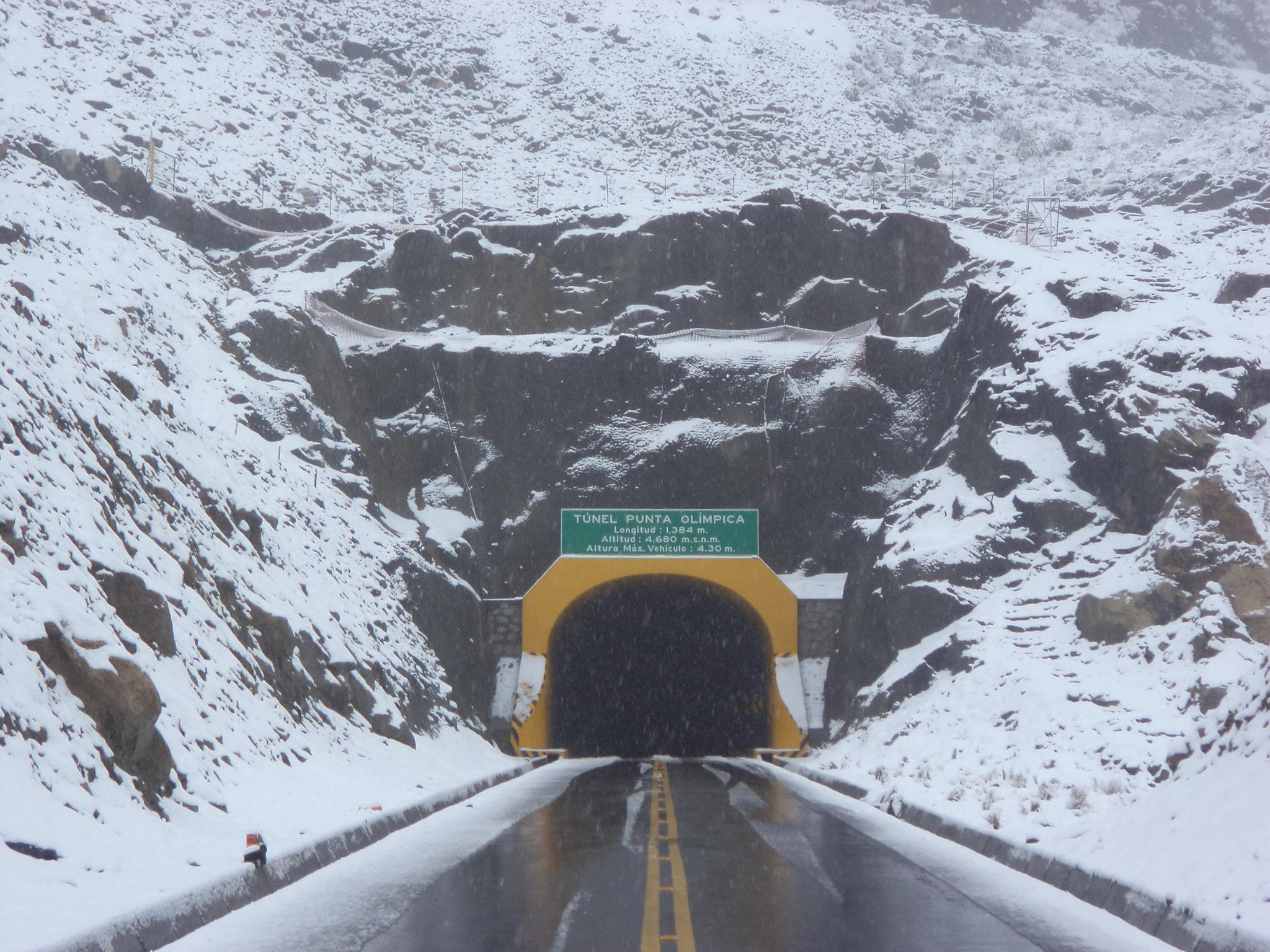 Túnel Punta Olímpica, lado Chacas